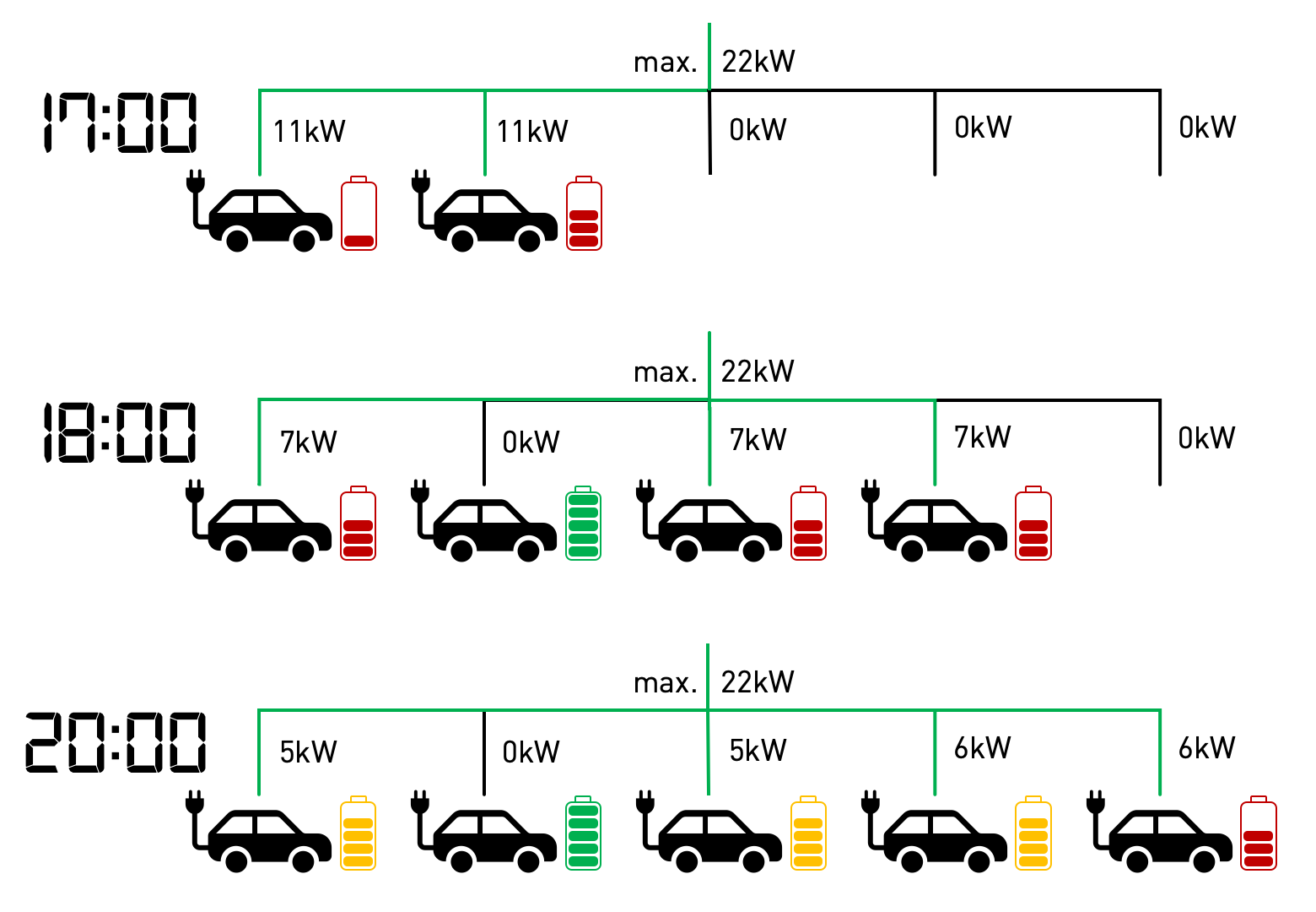 Darstellung der geregelten Ladeleistung bei dem Ladevorgang von Elektroautos